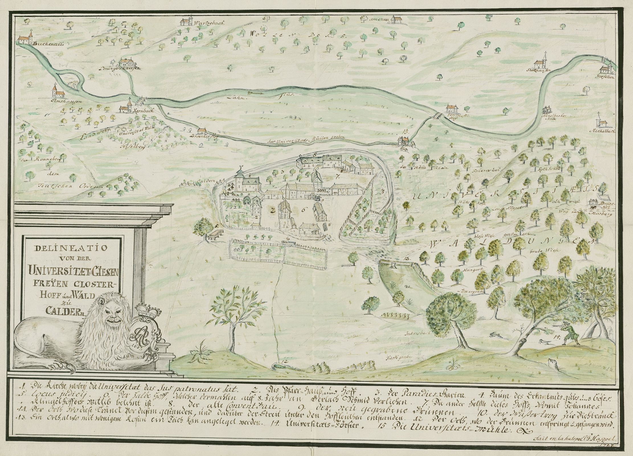 Plan des Klosterguts Caldern während der Zugehörigkeit zur Universität Gießen von 1722